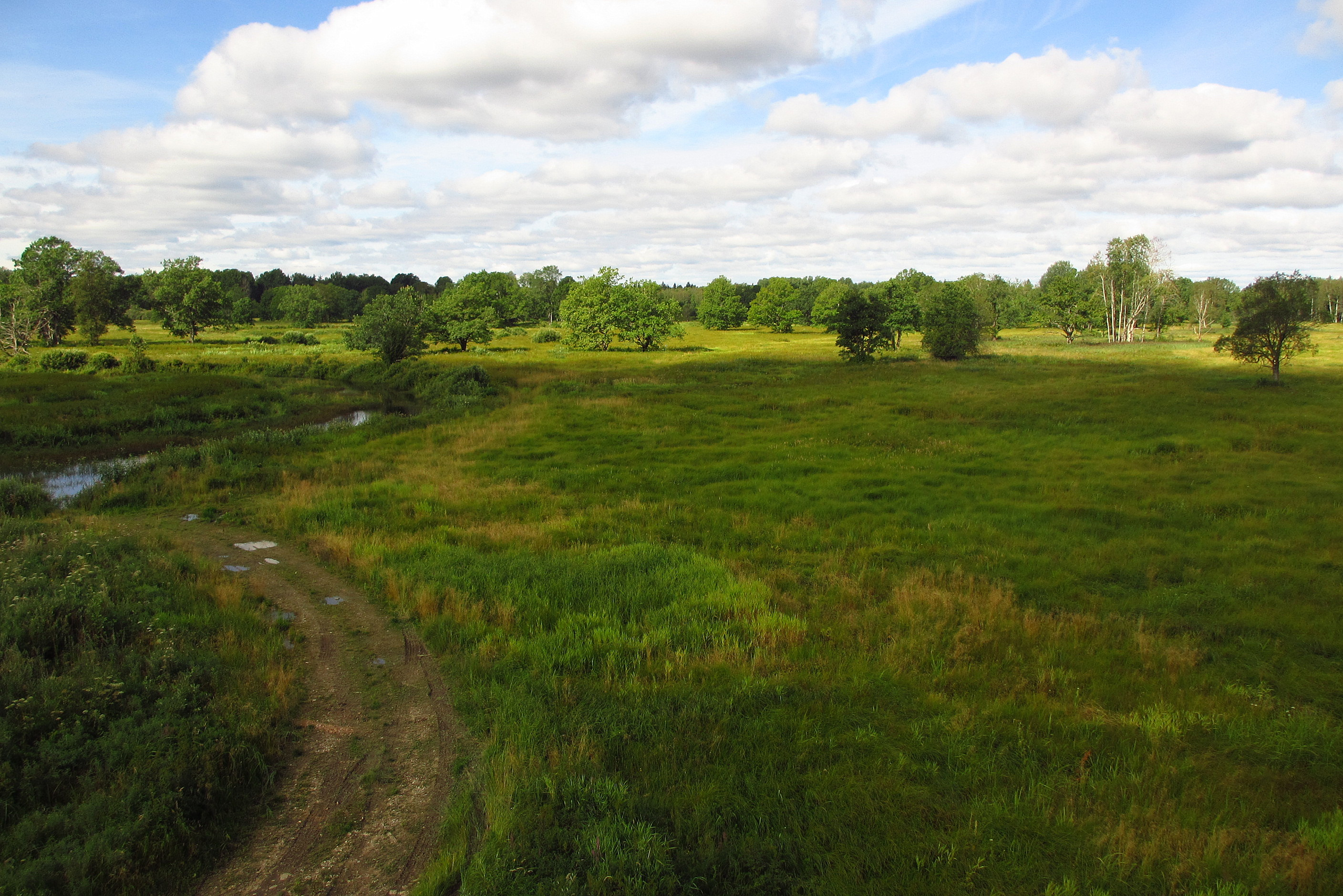 Tõramaa puisniit Soomaa rahvuspargis, vaade tornist